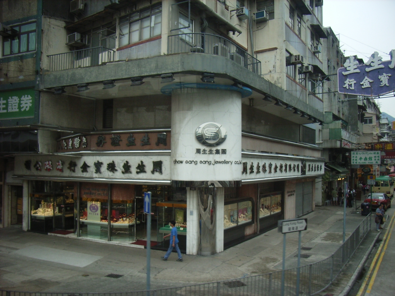 九龍城周生生分店。